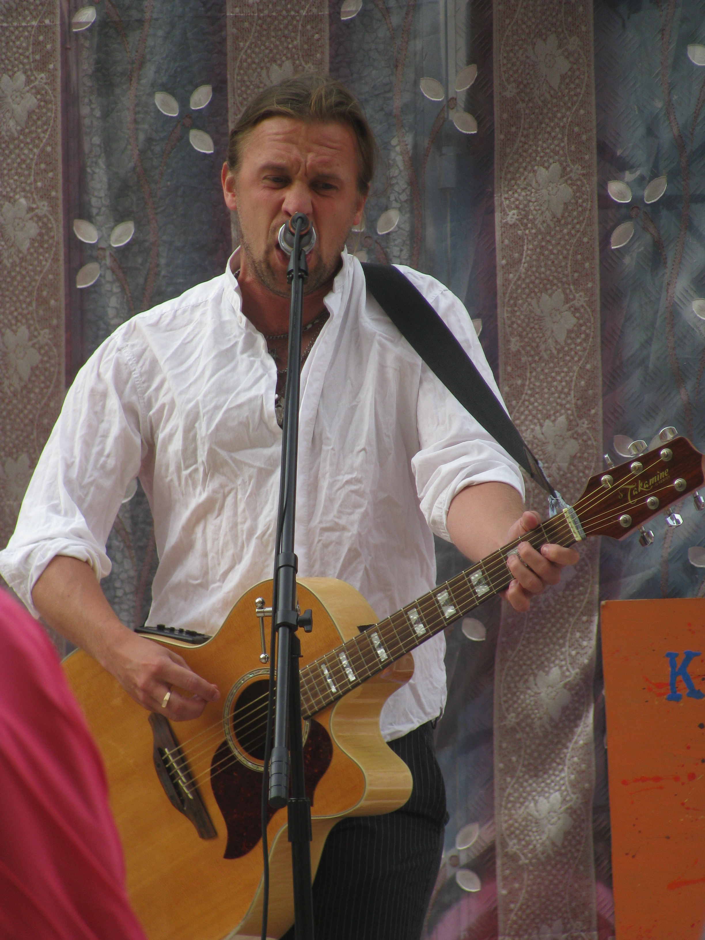 OlaOla live på Möllevångsfestivalen, 2010